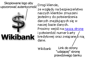 Grafika tłumacząca zasadę phishingu. Bank nie istnieje naprawdę, a proste logo nie jest objęte prawami autorskimi. Nazwa banku jest przypadkowa, nawiązująca wyłącznie do systemu wiki.